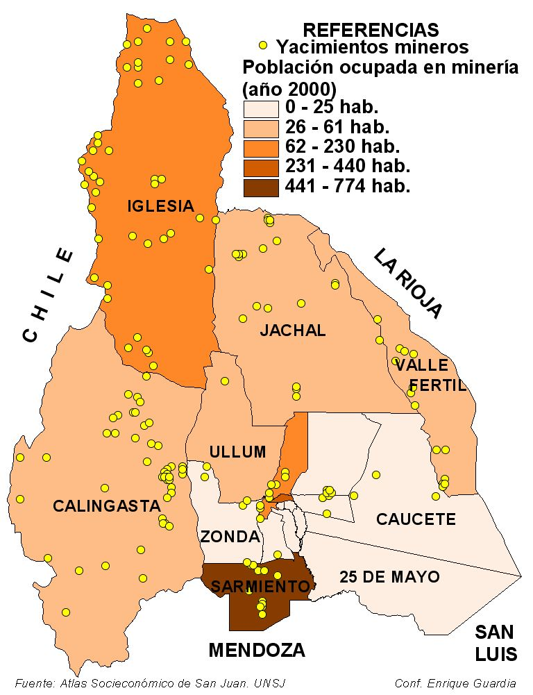 Mapa que representa la distribución de población ocupa en la actividad minera y los yacimientos mineros en la Provincia de San Juan, ubicada en el centro oeste de Argentina.